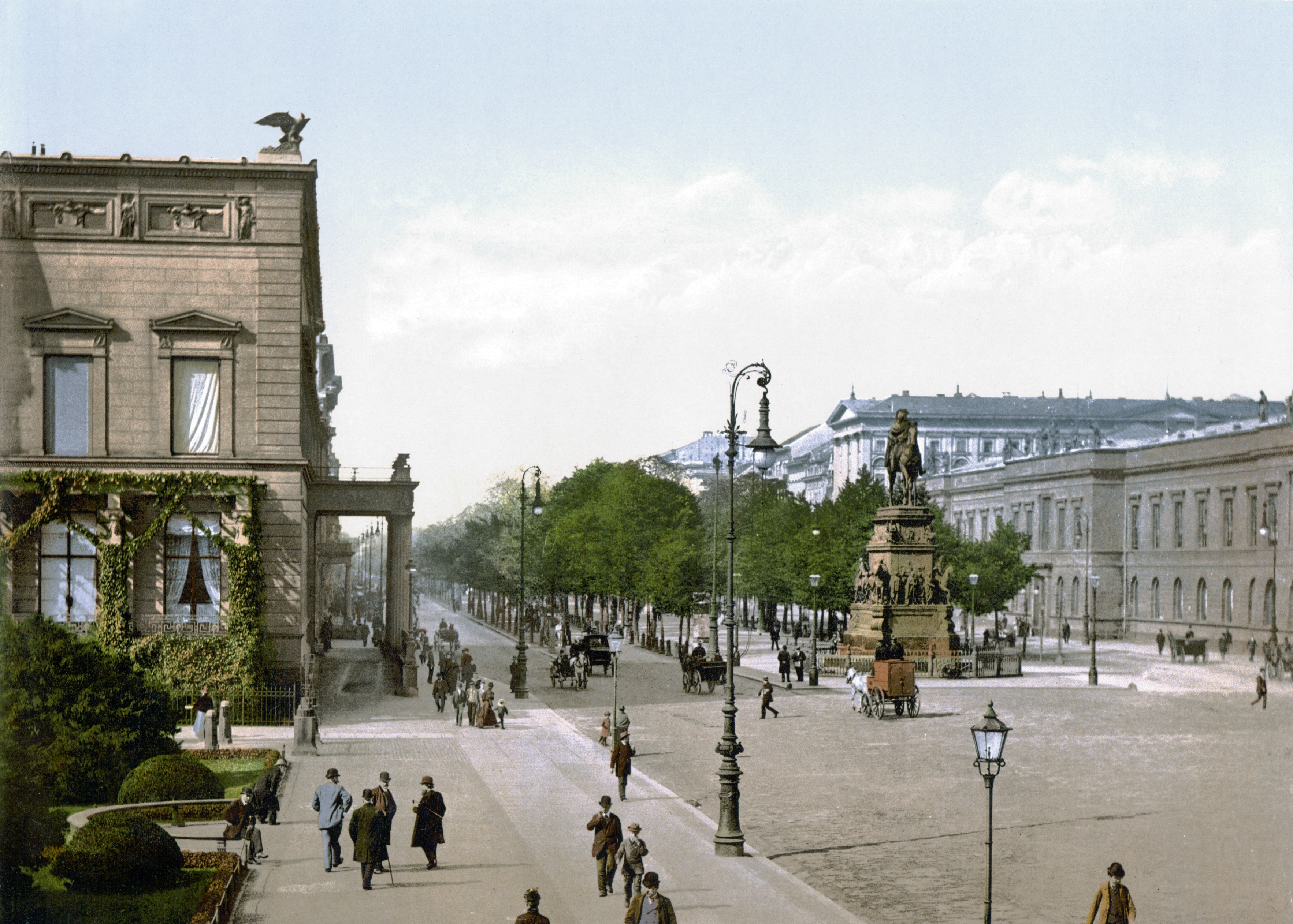 Berlin, Unter den Linden zwischen 1890 und 1900